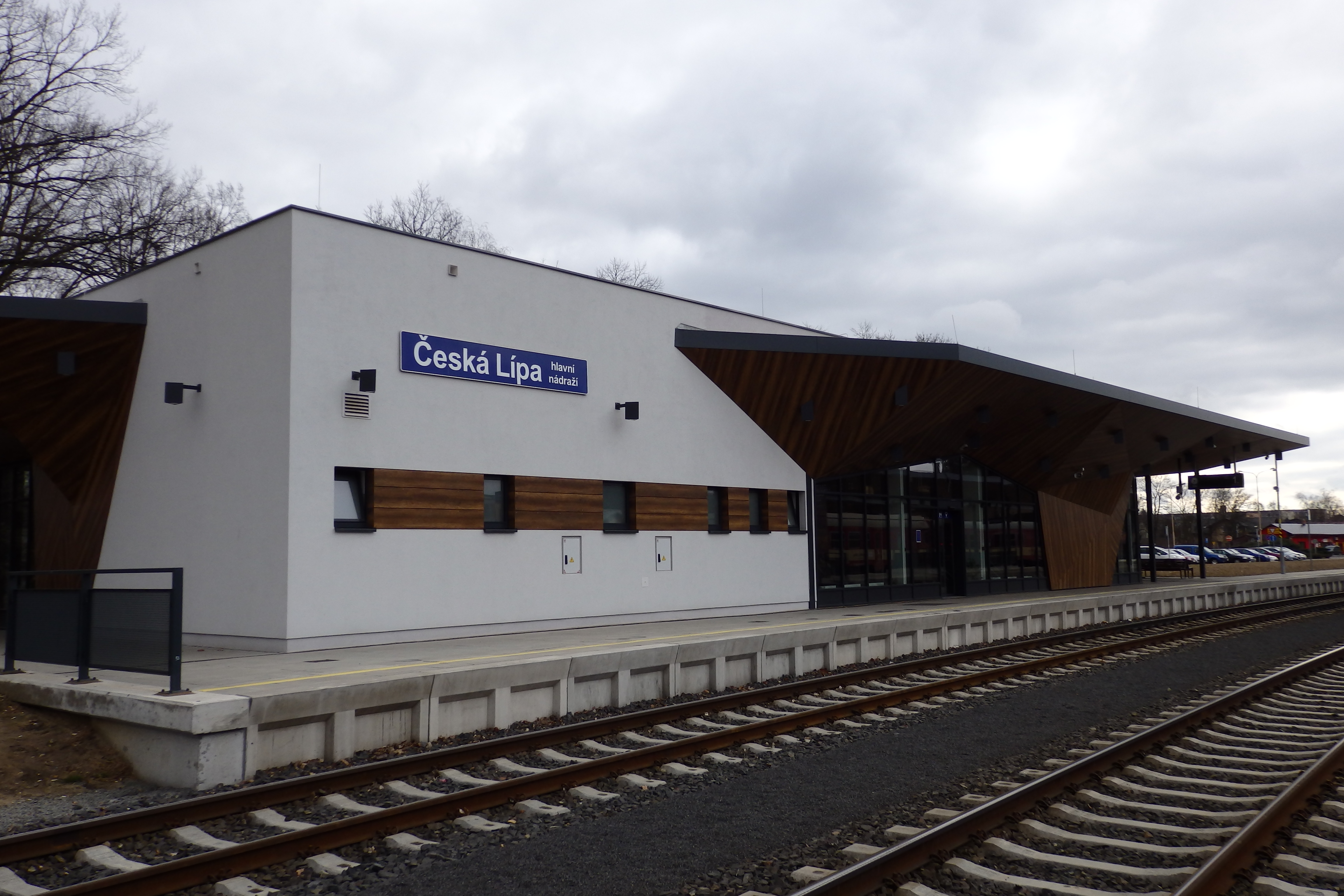 Česká Lípa-nádraží ČD-nová budova